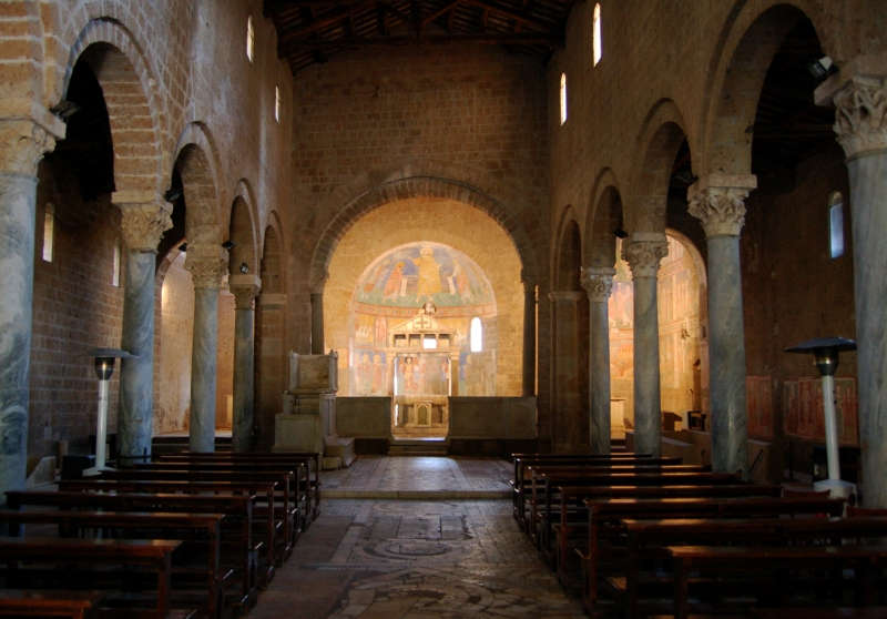 Veduta dell'interno della Basilica di Sant'Elia a Castel Sant'Elia (provincia di Viterbo) (fotografia scattata da campaz con il permesso della persona che custodisce la chiesa)